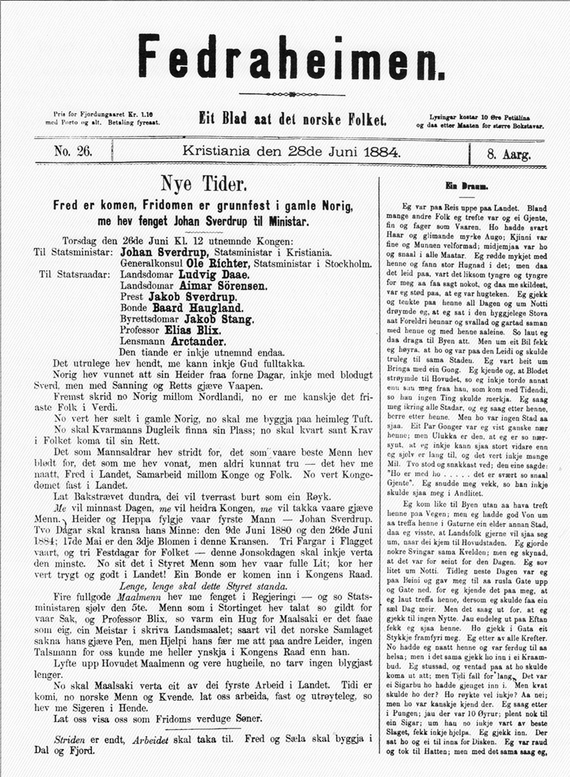 Fedraheimen nr. 26 1884